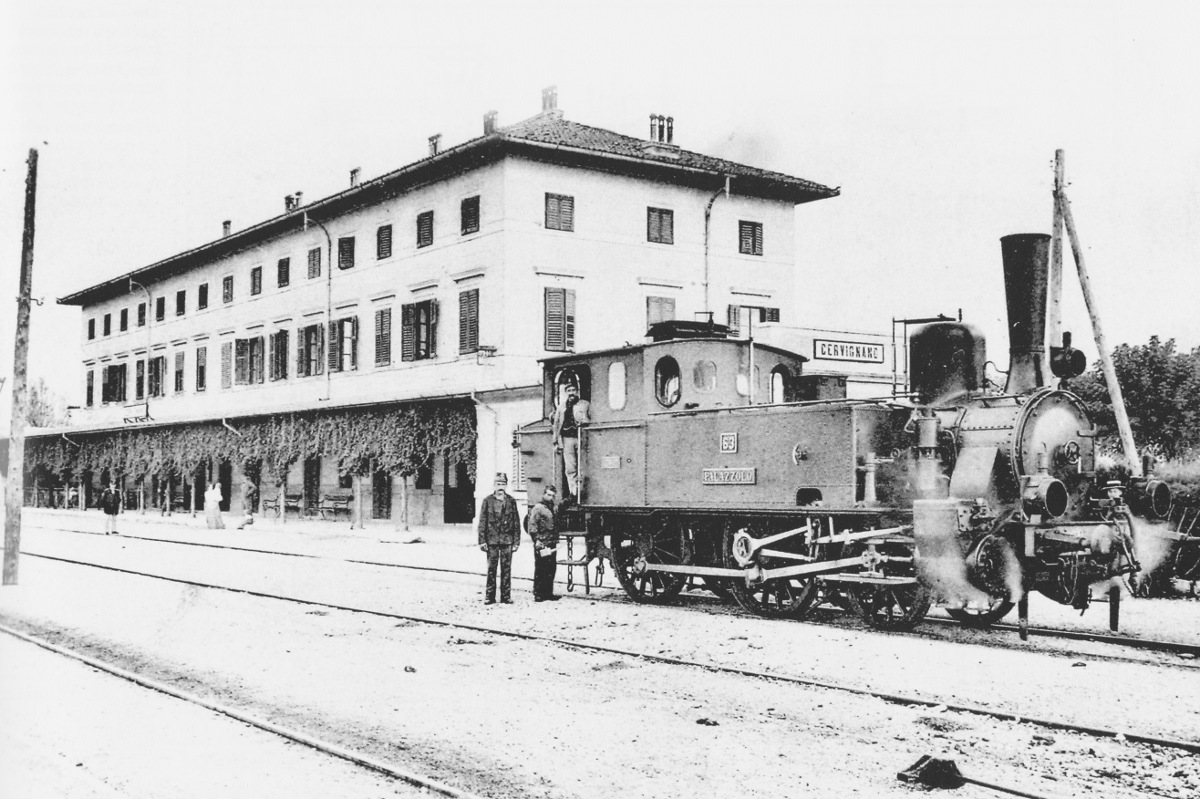 La locomotiva 63 "Palazzolo" della Società Veneta in sosta presso la stazione di Cervignano. Circa 1906.